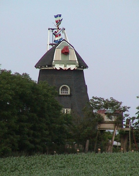 Lepahner Mühle – ein 1884/85 von Carl Friedrich Trahn fürs Gut Lehmkuhlen erbauter Galerieholländer – Lepahn, Lehmkuhlen, Kreis Plön, Schleswig-Holstein, Deutschland